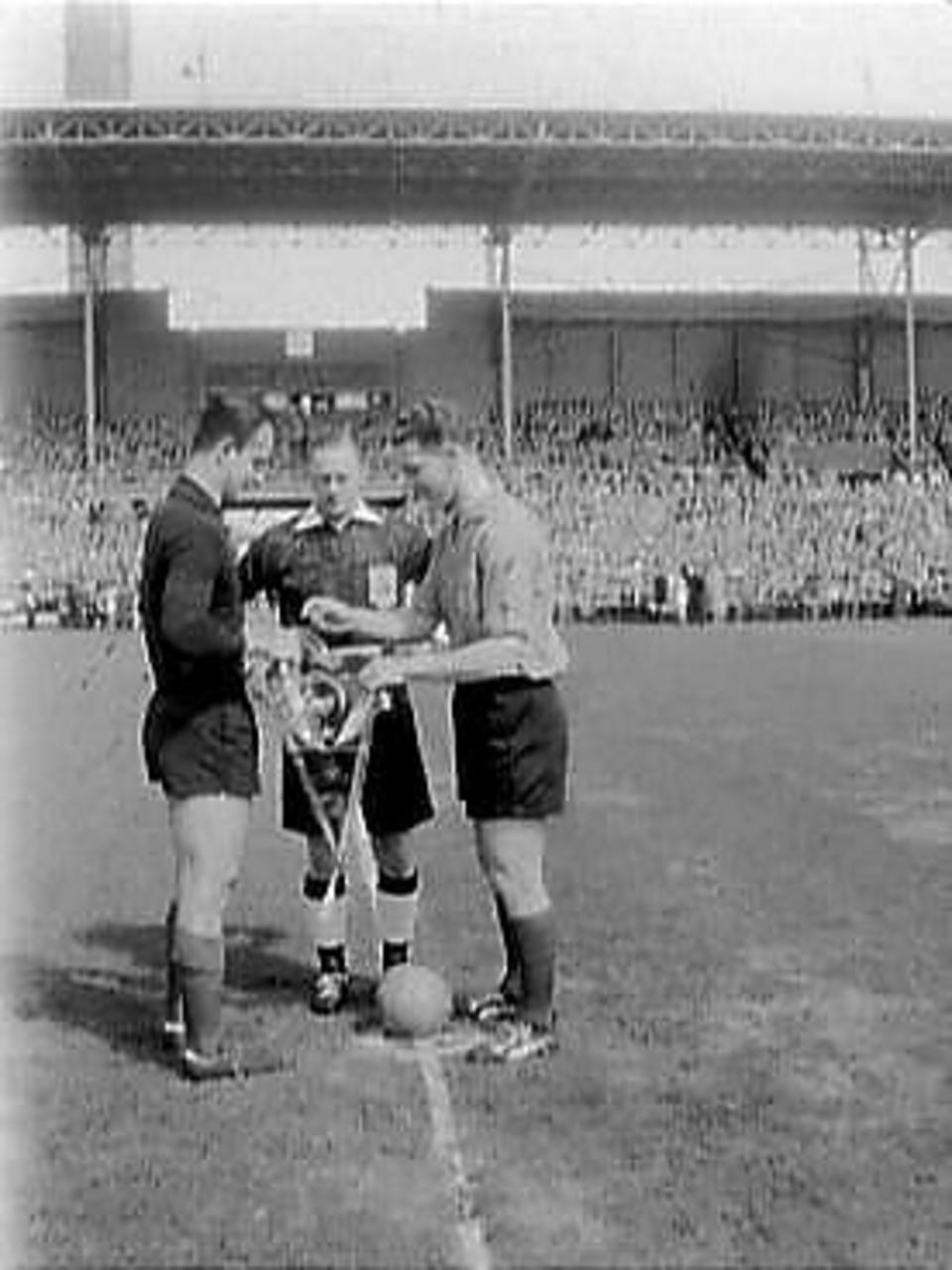 4 Mayıs 1958'te Hollanda ile Türkiye arasında oynanan maç öncesinde iki takımın kaptanı flama değişimi yaparken. Solda Turgay Şeren, sağda Cor van der Hart.